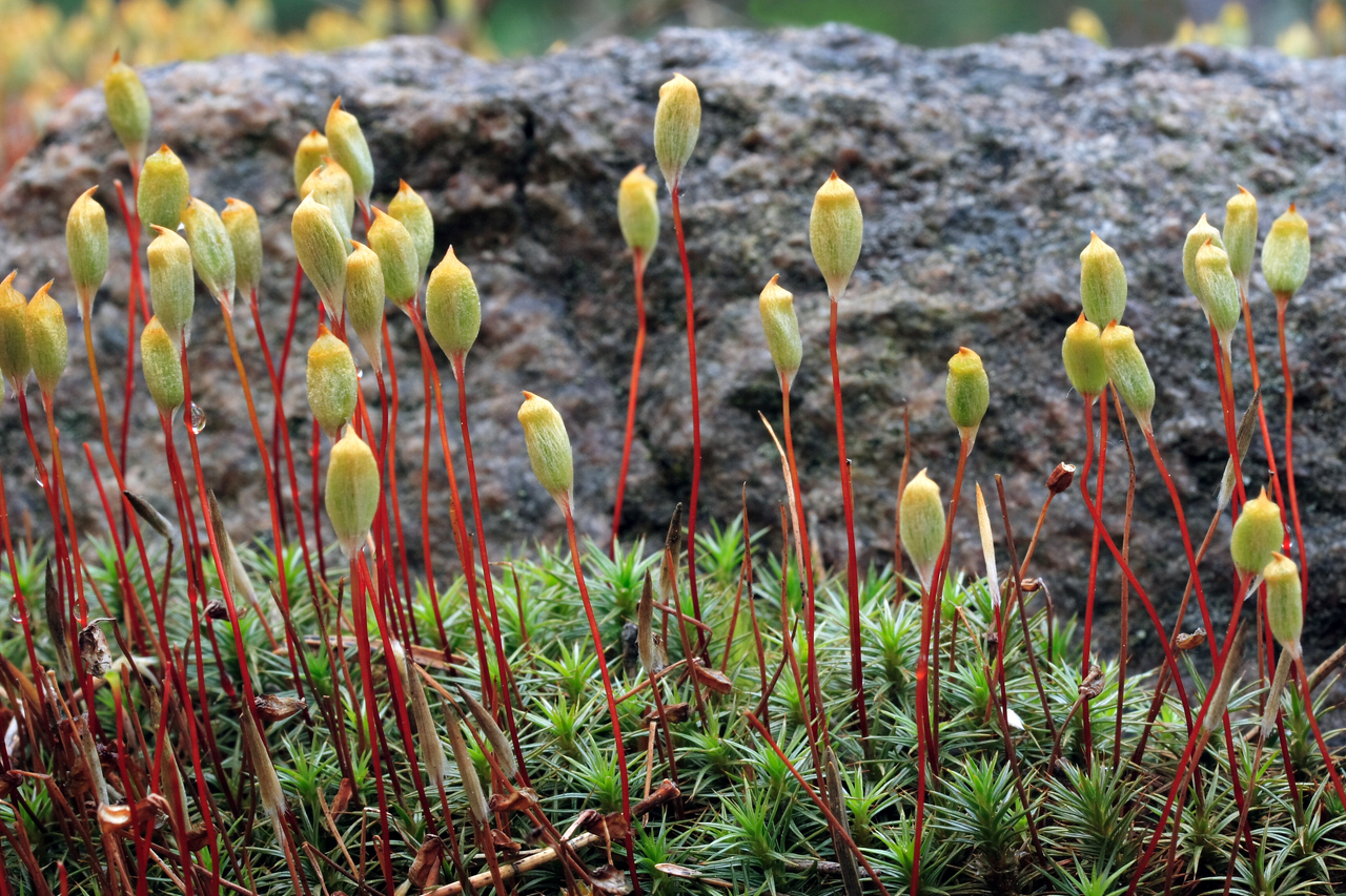 Pogonognathum moss (Pogonatum urnigerum